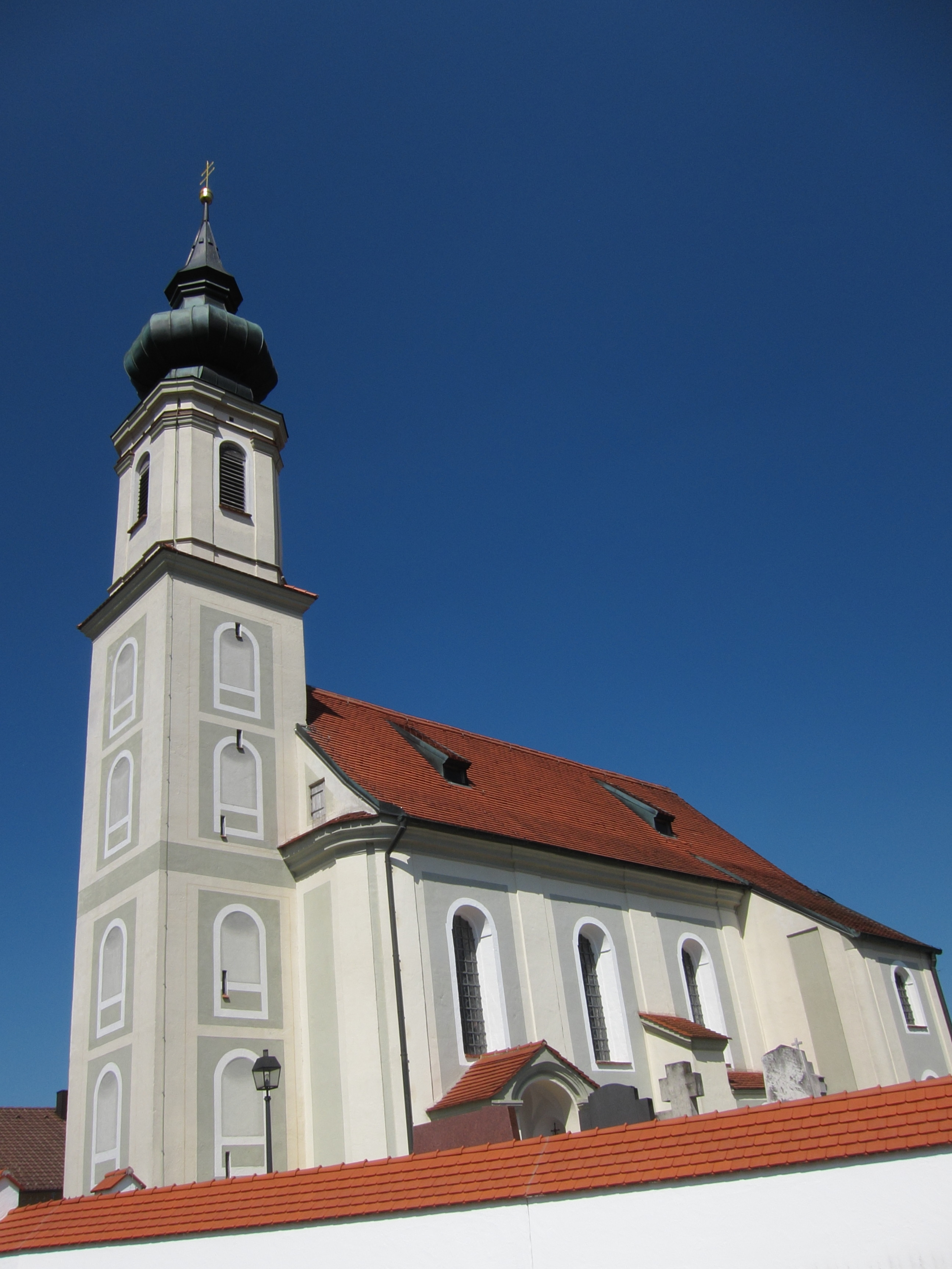 Landersdorf 12; katholische Filialkirche St. Martin, Saalbau mit eingezogenem Chor, angefügter Sakristei und Westturm mit Haubendach, von Johann Baptist Lethner, 1762.